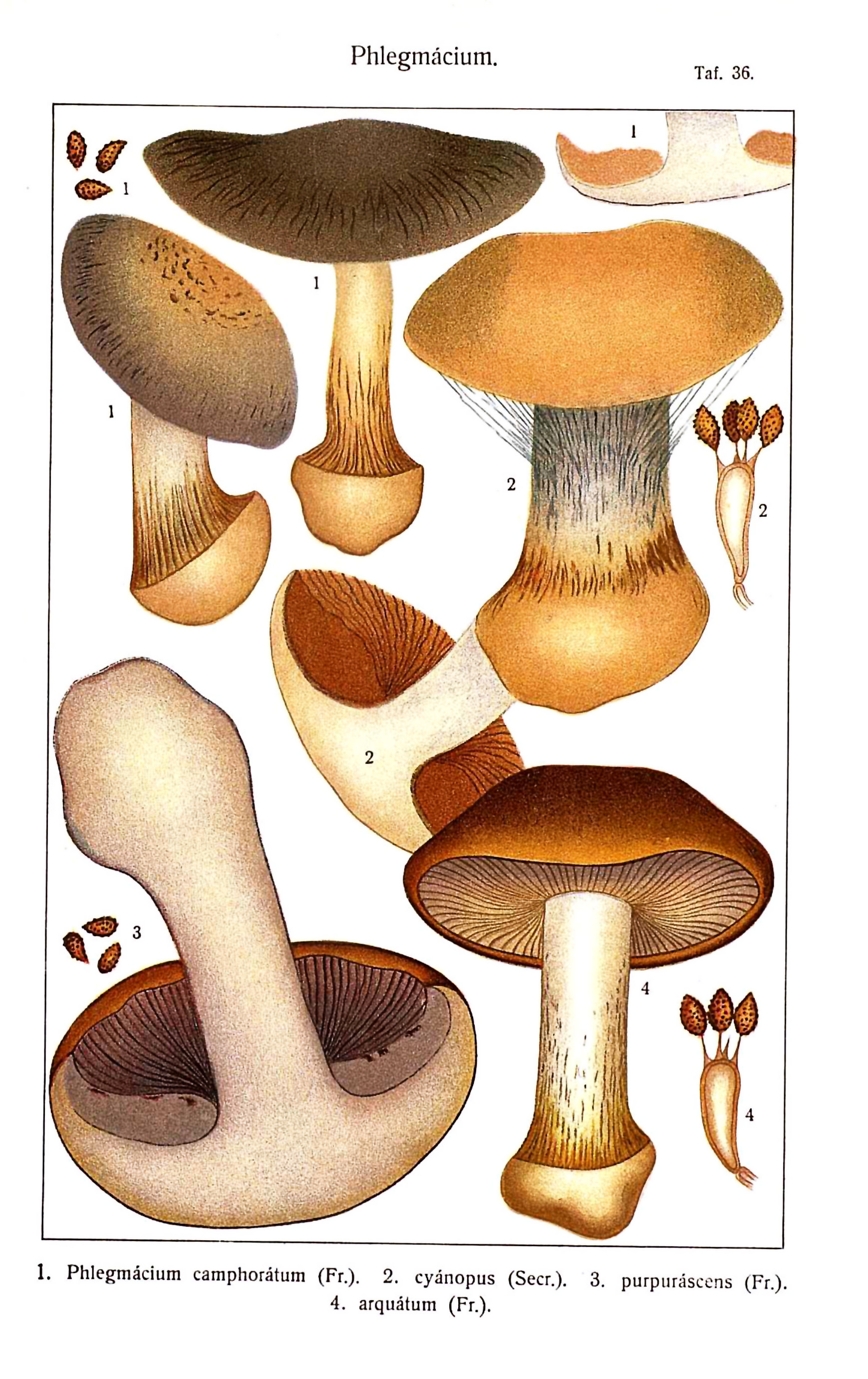 Adalbert Ricken: Die Blätterpilze (Agaricaceae) Deutschlands. (II. Band. Abbildungen), 1915; Tafel. 36 1. Phlegmacium camphoratum (Fr.) (=Cortinarius camphoratus). 2. Phlegmacium cyanopus (Secr.) (=Cortinarius porphyropus). 3. Phlegmacium purpurascens (Fr.) (=Cortinarius purpurascens ). 4. Phlegmacium arquatum (Fr.) (=Cortinarius arquatus).